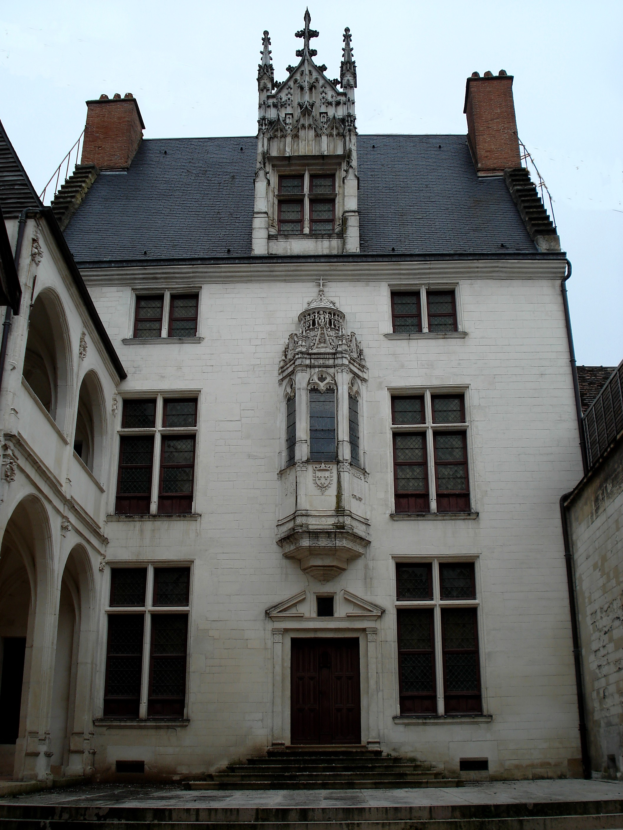 Hôtel Juvénal des Ursins, rue Champeaux, Troyes (Aube, France). Construit en 1524. Façade avec oriel décoré.